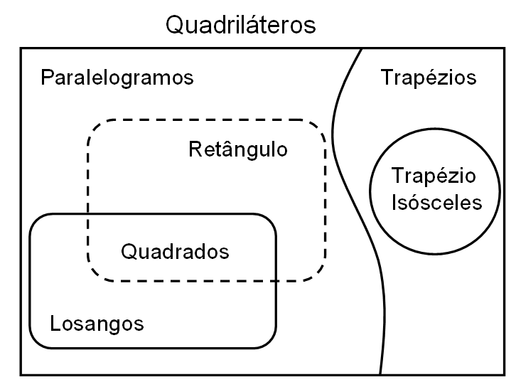 Paralelogramos